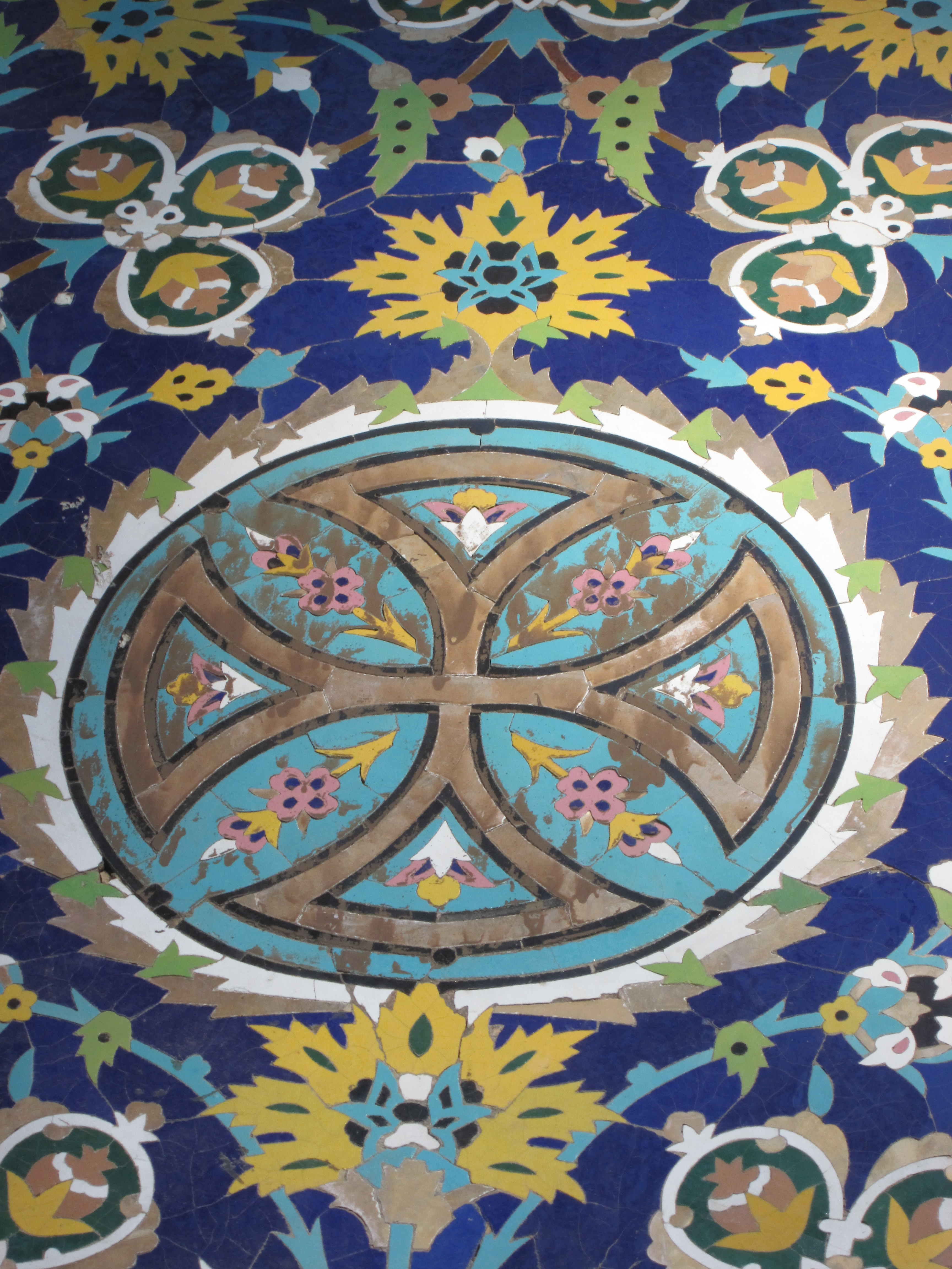 نُماد چلیپا، کاری از استاد عیسی بهادری، هنرمند اصفهانی در کاشیکاری و معماری که بر دیواره‌ی نبش چهارراه عباس آباد کار شده است.